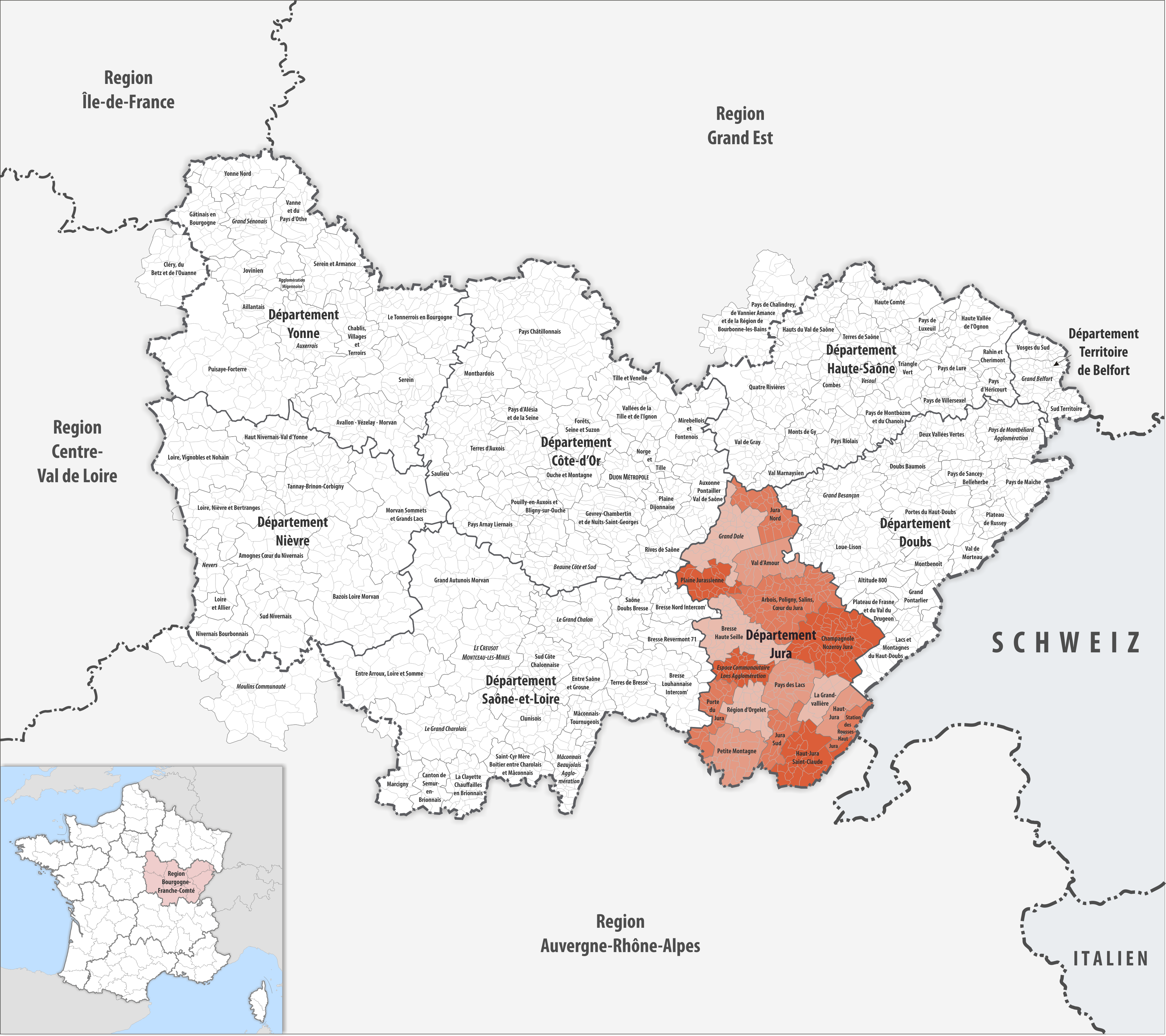 Gemeindeverbände im Département Jura